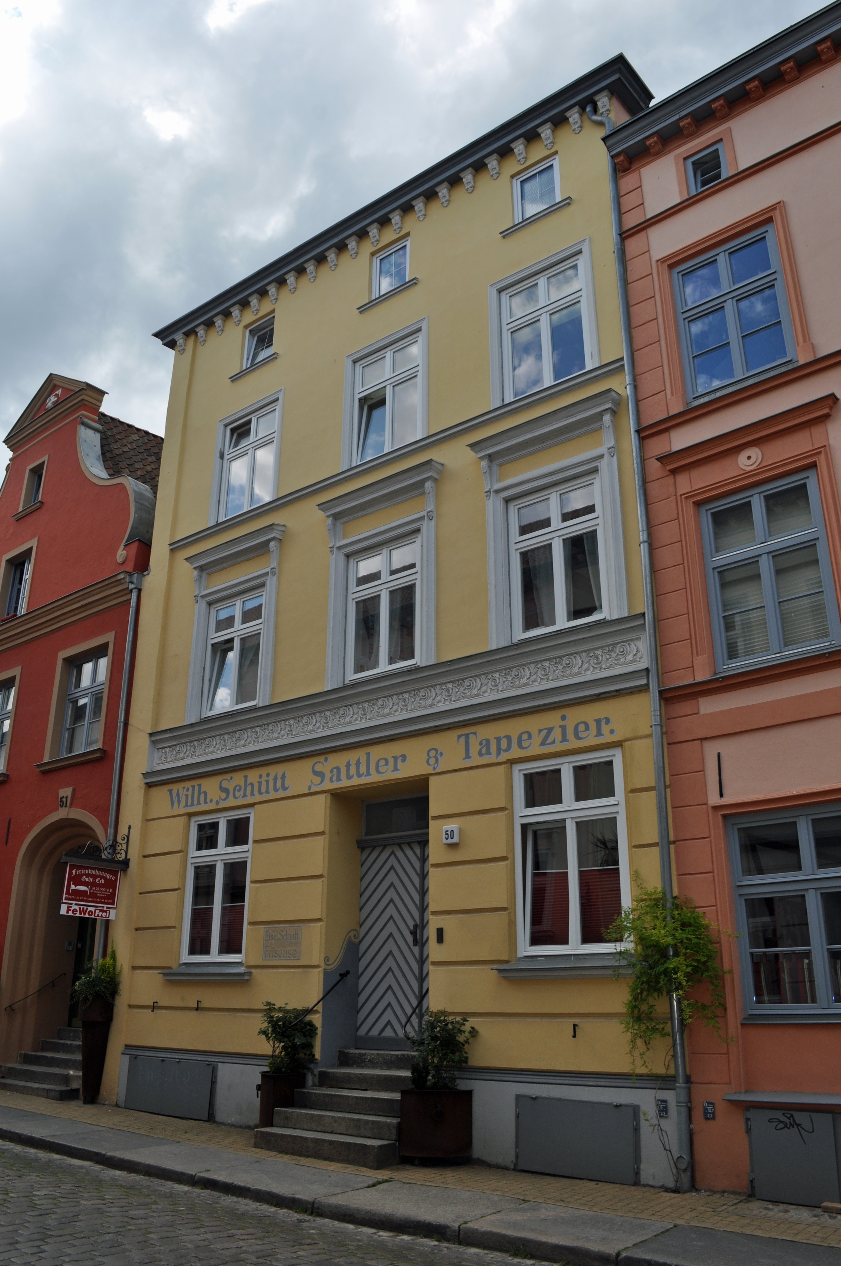 Das Foto zeigt ein Haus (bzw. Details des Hauses) in der Frankenstraße in Stralsund, Deutschland. Die Hausnummer steht im Dateinamen. Aufgenommen am 19. Juli 2011 vom Benutzer:Klugschnacker.